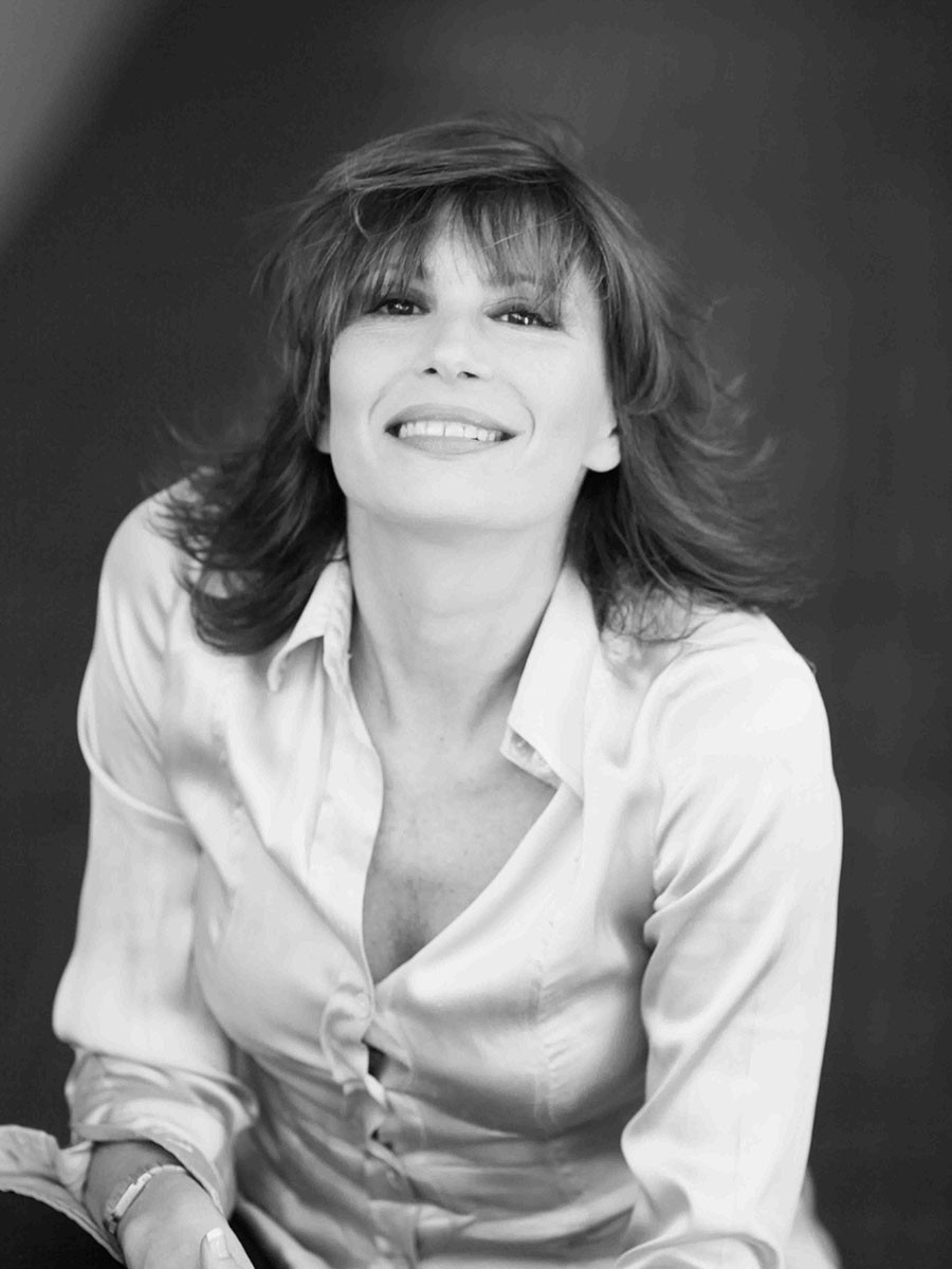 Antonella Fattori: attrice di Cinema, Teatro e Televisione